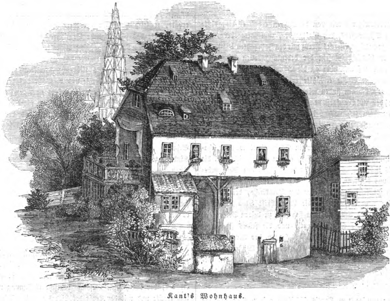 Das Wohnhaus des Philosophen Immanuel Kant in Königsberg, 1844.